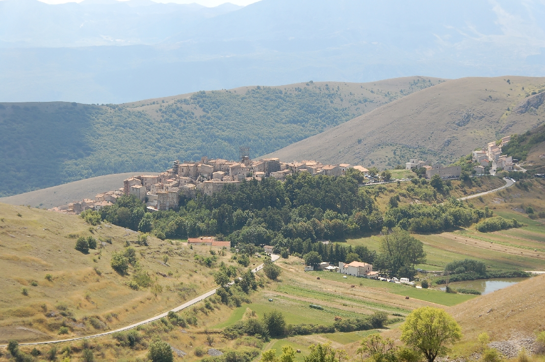 San Stefano di Sessanio 2011